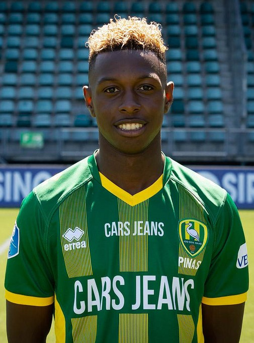 Shaquille Pinas